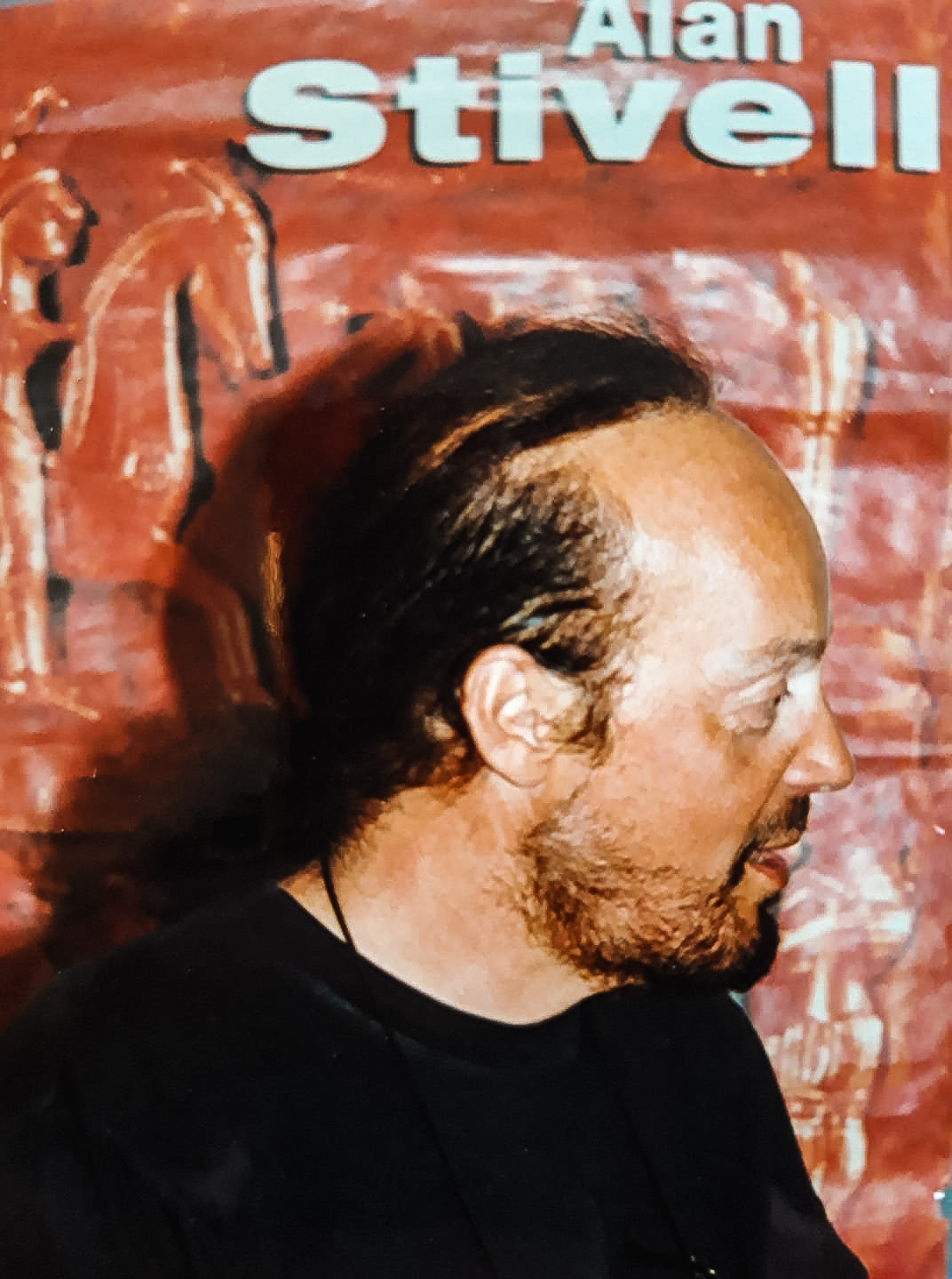 Alan Stivell en conférence de presse avant la Fête de la Saint-Loup à Guingamp le 16 août 1996.